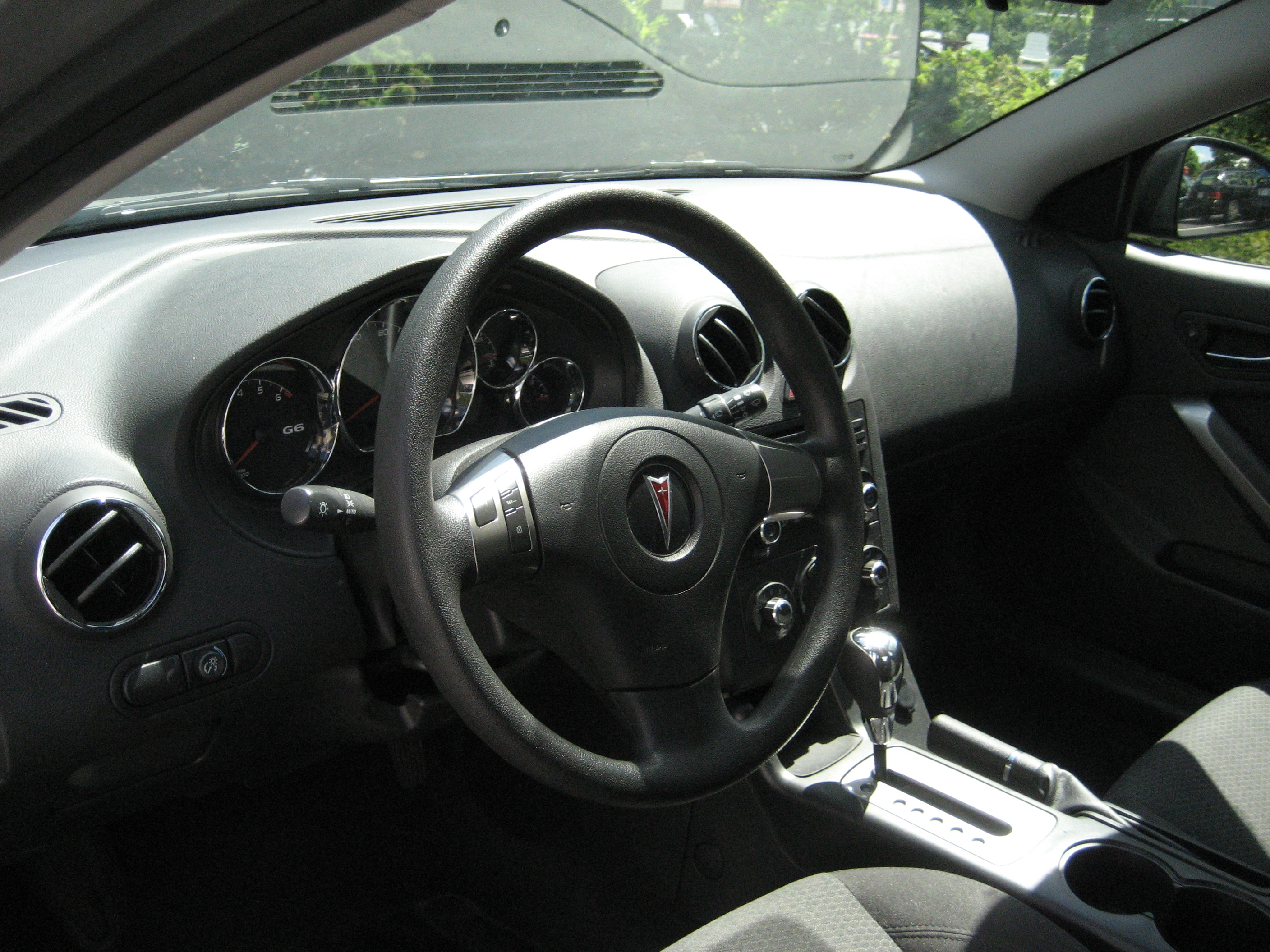 2006 Pontiac G6 PO dashboard